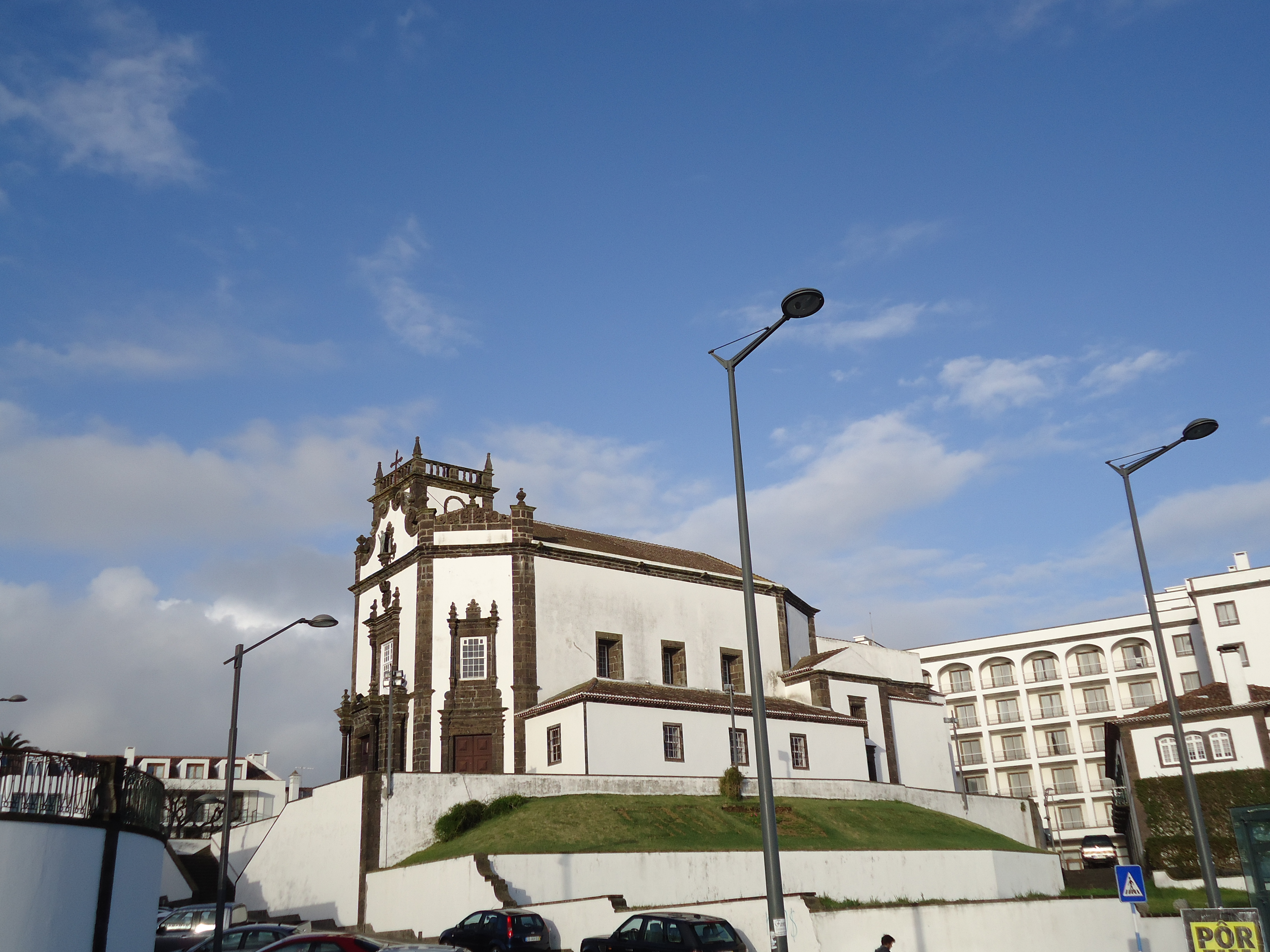 Igreja de São Pedro, Ponta Delgada, ilha de São Miguel, Açores.